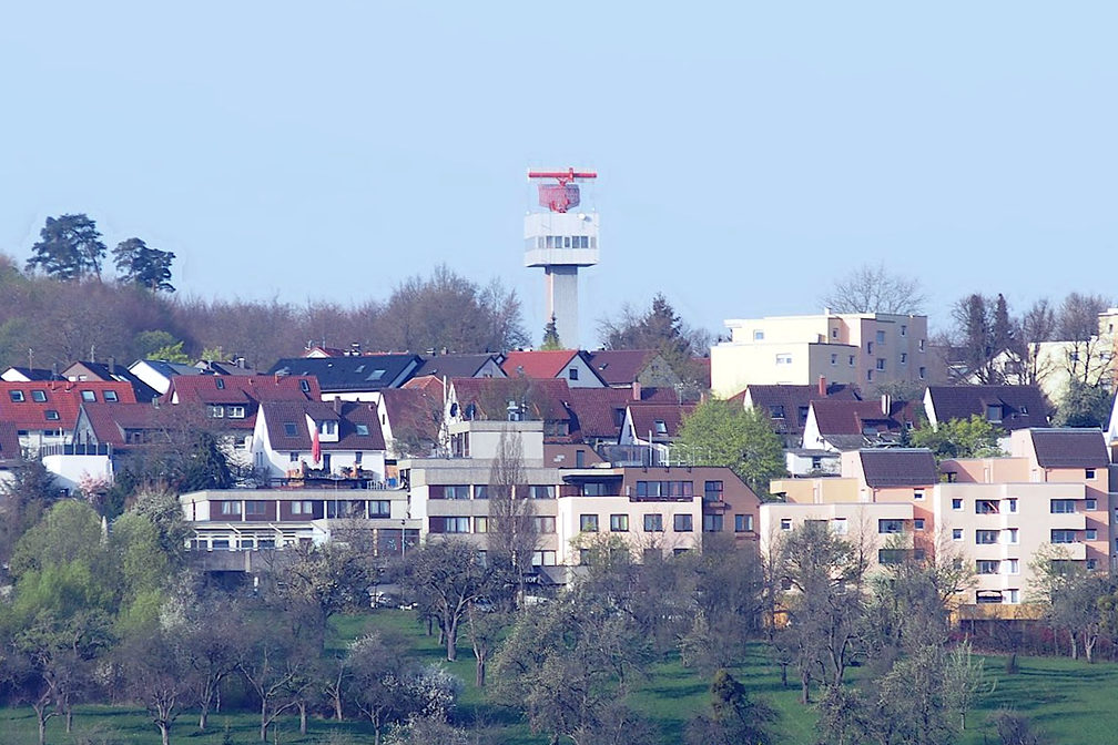 Anflugradar des Flughafen Stuttgart in Stetten auf den Fildern